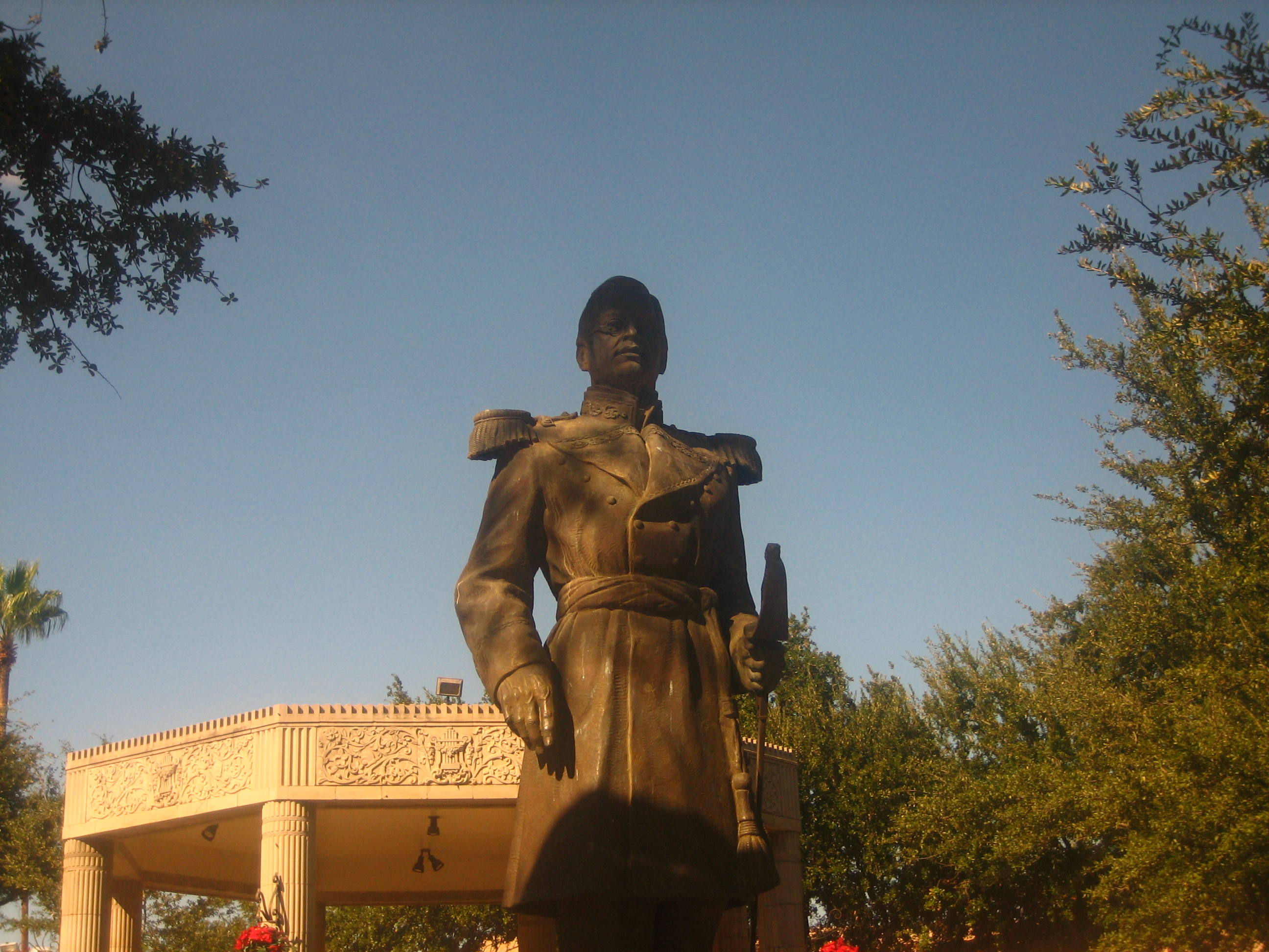 Monument of Ignacio Zaragoza in Laredo in Texas